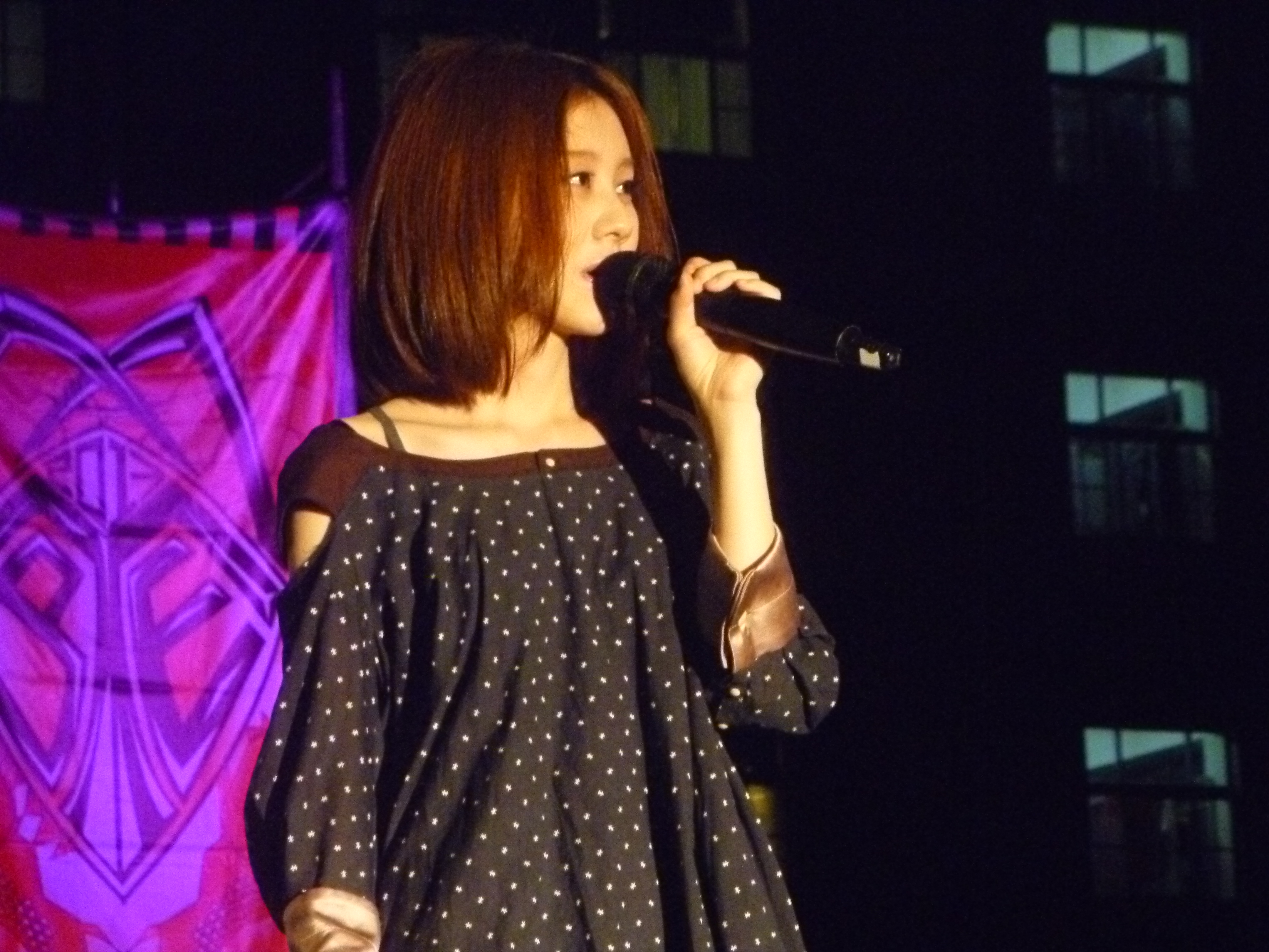 中文（台灣）: 白安在南台科大《Maybe》畢業演唱會